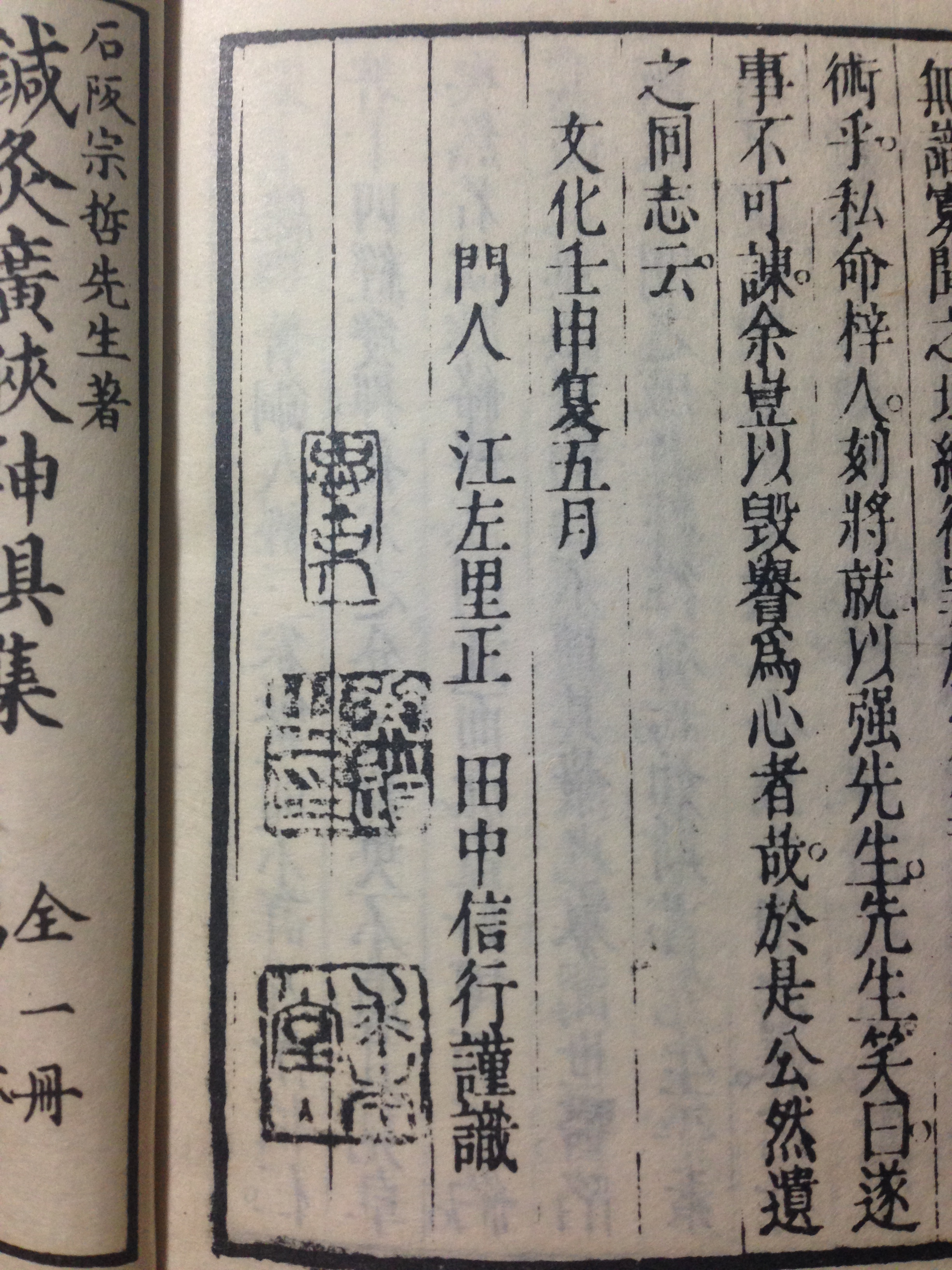 江戸時代後期、石坂宗哲著「鍼灸説約(1811-1812)」のあとがき写真。門人 江左里正 田中信行によるもの。文化壬申とは文化9年(1812年)